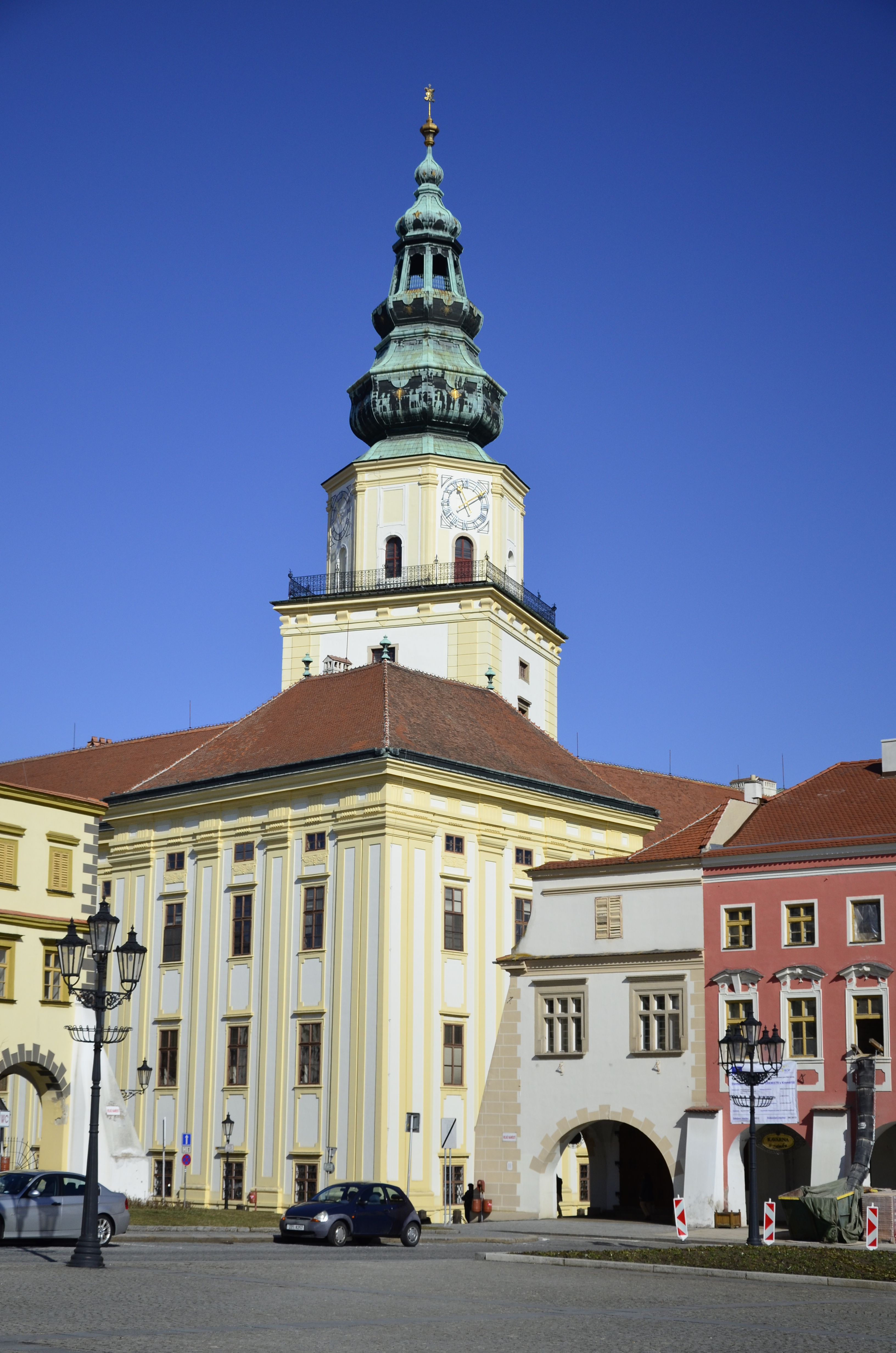 Zámek Kroměříž, nám. Sněmovní, též ZSJ Podzámecká zahrada 1/2, Kroměříž